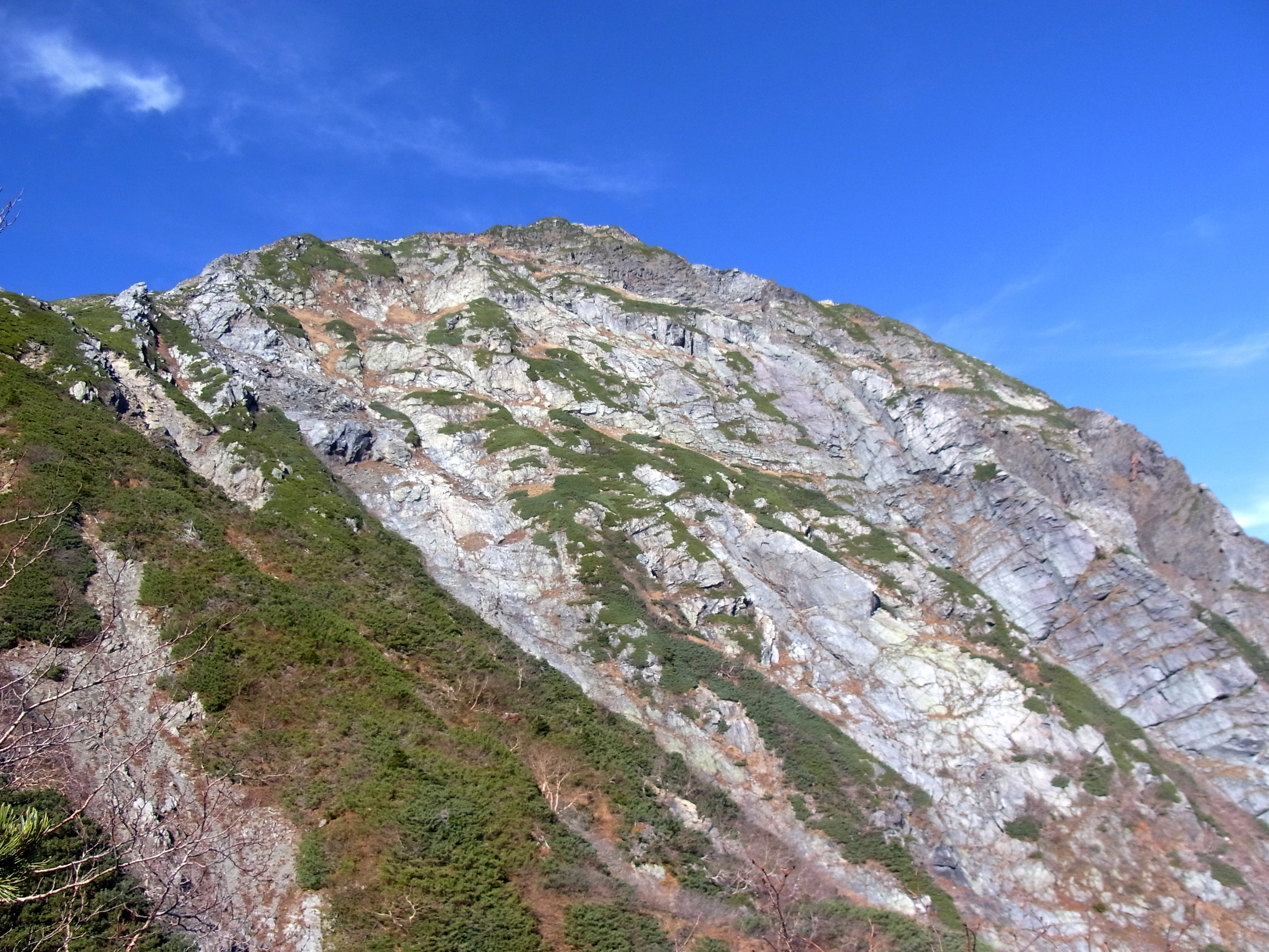 北岳バットレス (2010年10月10日 第4尾根大規模崩落後）